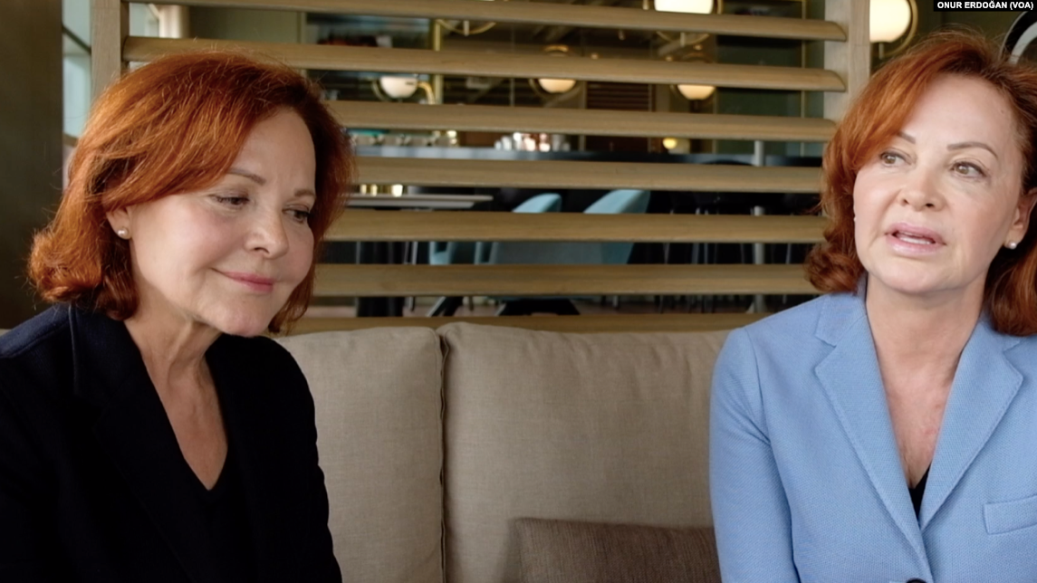 Türk tek yumurta ikizi piyanistler, Güher Pekinel ve Süher Pekinel.